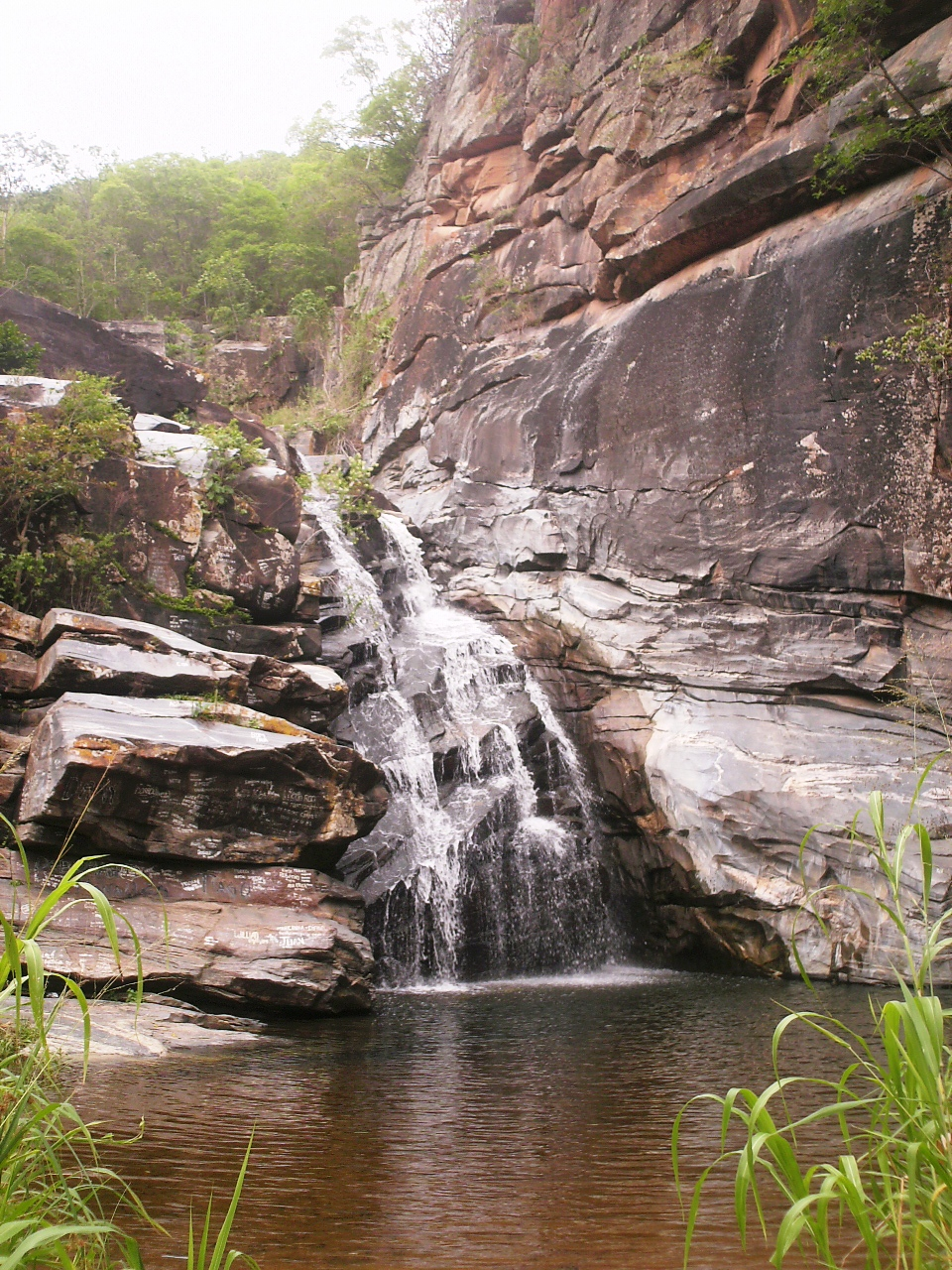 Cachoeira do Inferno, Pedra Branca, Ceará, Brasil.